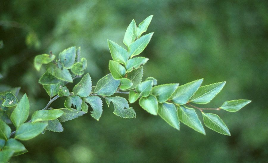 Nothofagus nitida, Scheinbuchengewächse (Nothofagaceae) - Chile, ca. 15 km NE Pargua (Prov. de Llanquihue)